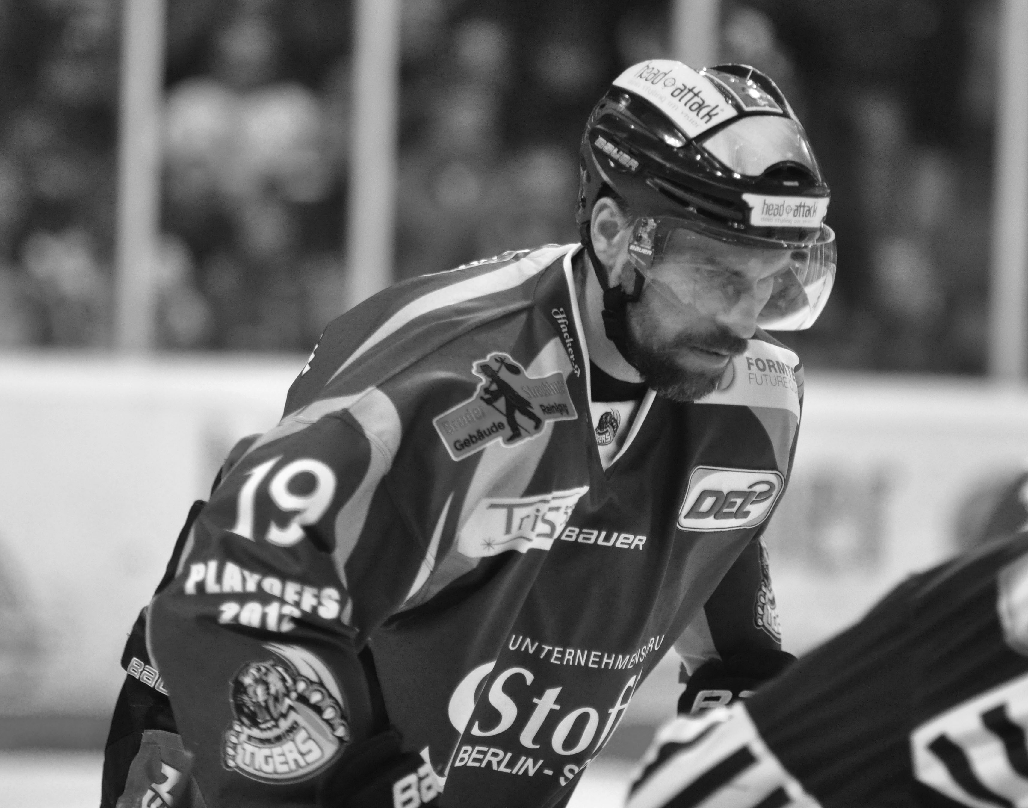 Straubing Tigers - Eisbären Berlin 07.04.2012 DEL PlayOff Halbfinale